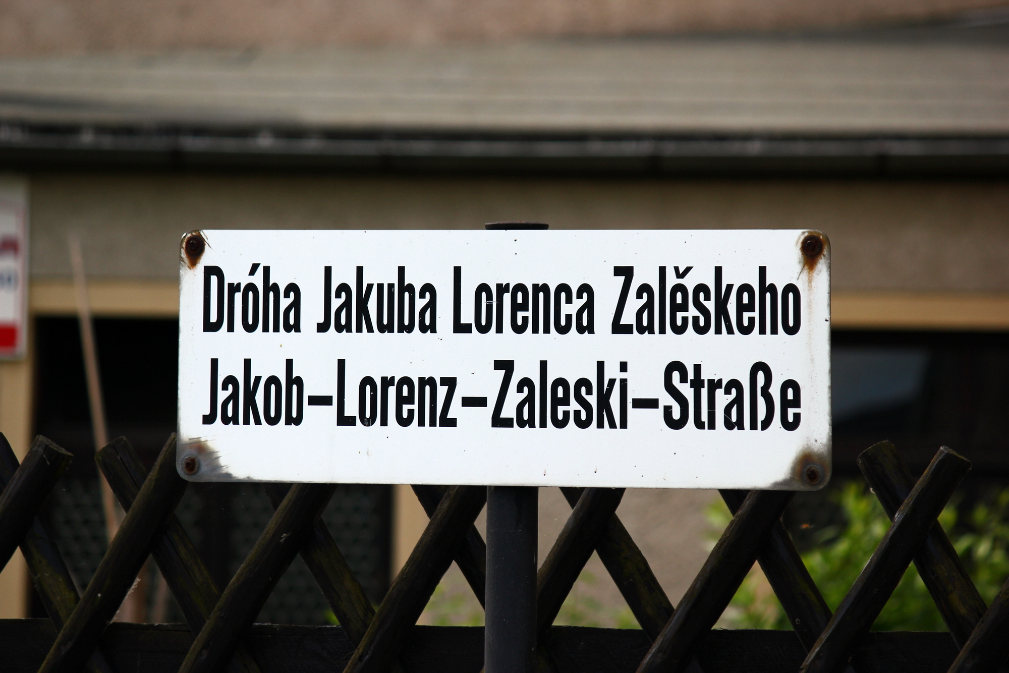 Hornjoserbsce: Dwurěčna tafla w Radworju.